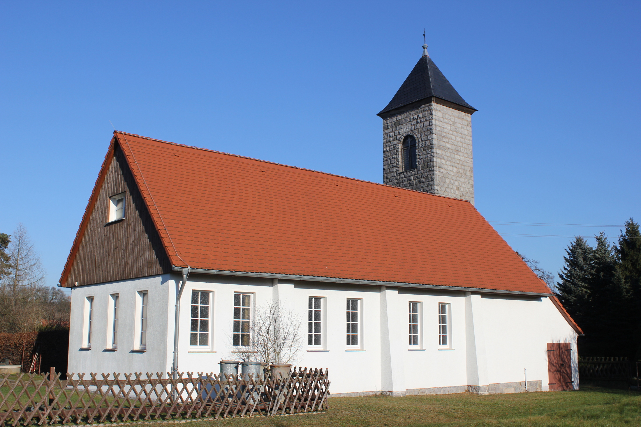 Hornjoserbsce: Spočatk 1950tych lět natwarjena Połpičanska cyrkej (gmejna Malešecy).